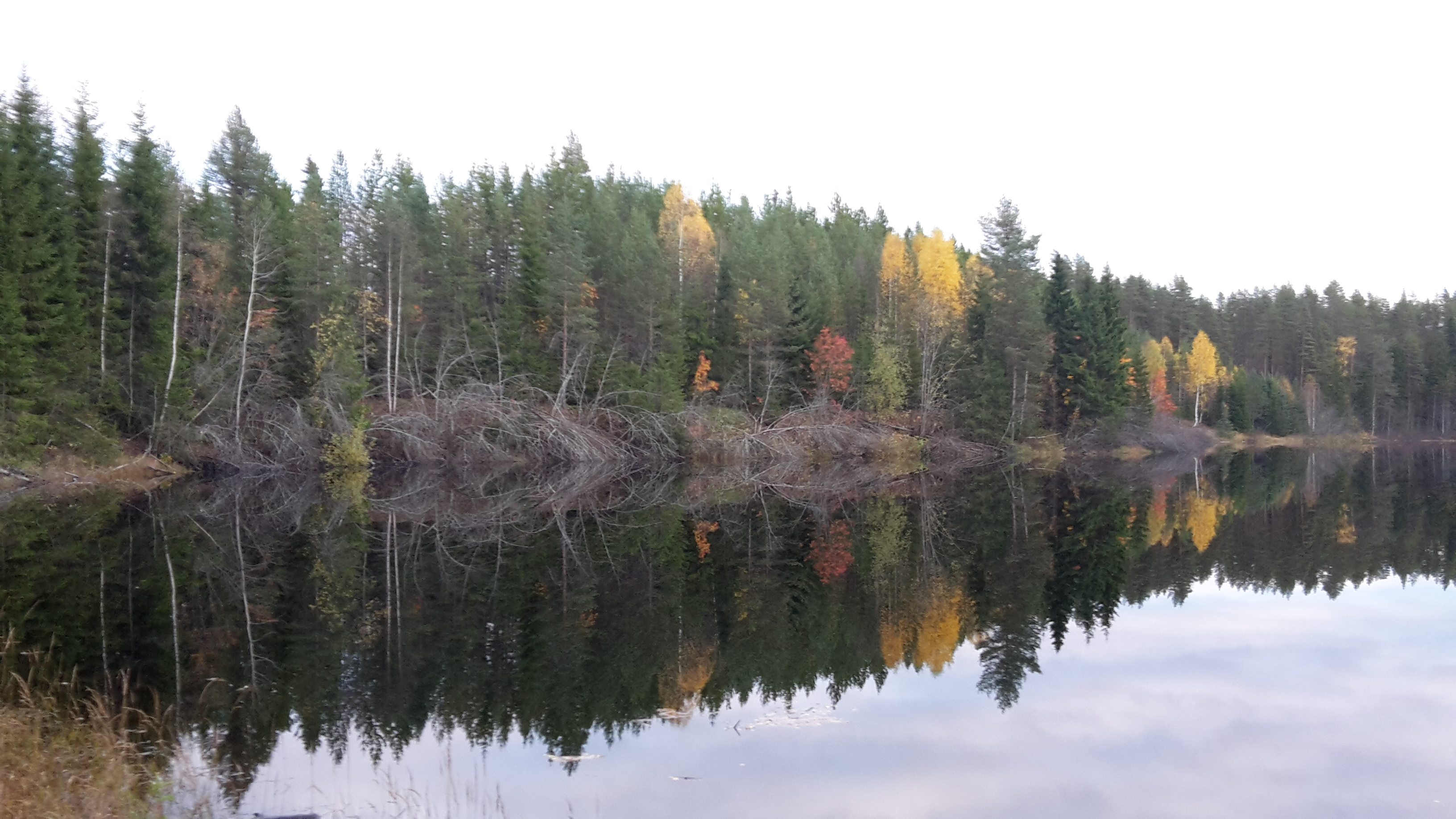 Mörttjärnen i vy mot öster, dvs. med Lägstaån bakom moränåsen.